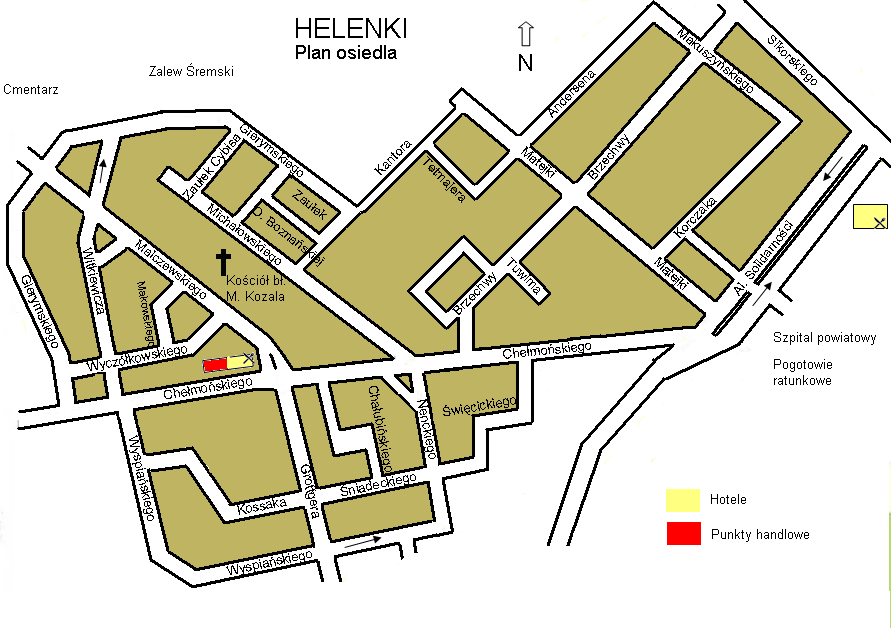 Śrem, Helenki, plan osiedla